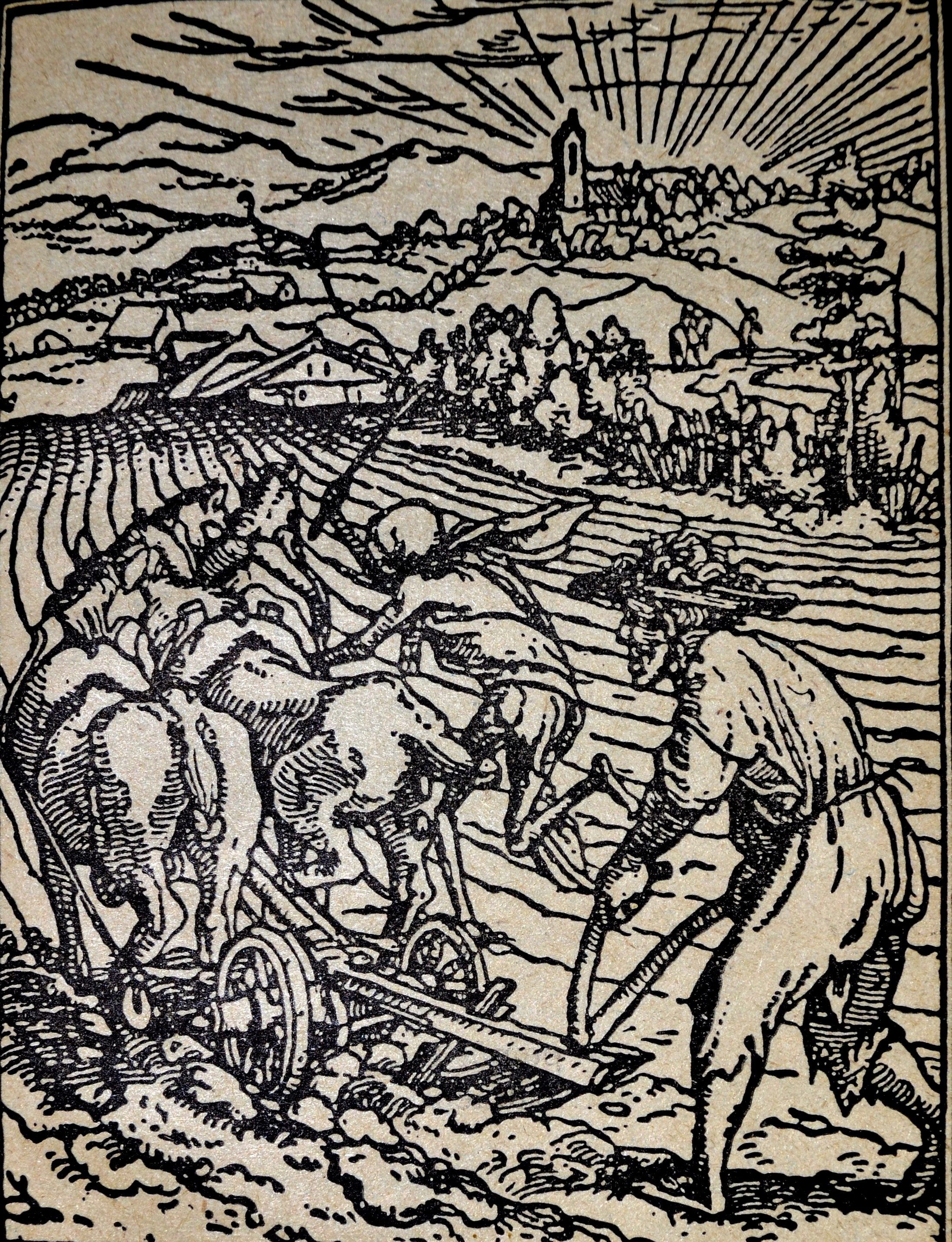 Hans Holbein: Kmet in smrt, lesorez iz knjige Rosenow: Kulturbilder aus den Religionskämpfen des 16. und 17. Jahrhunderts, objavljen v knjigi Bratka Krefta Velika puntarija kot ilustracija k 5. dejanju.